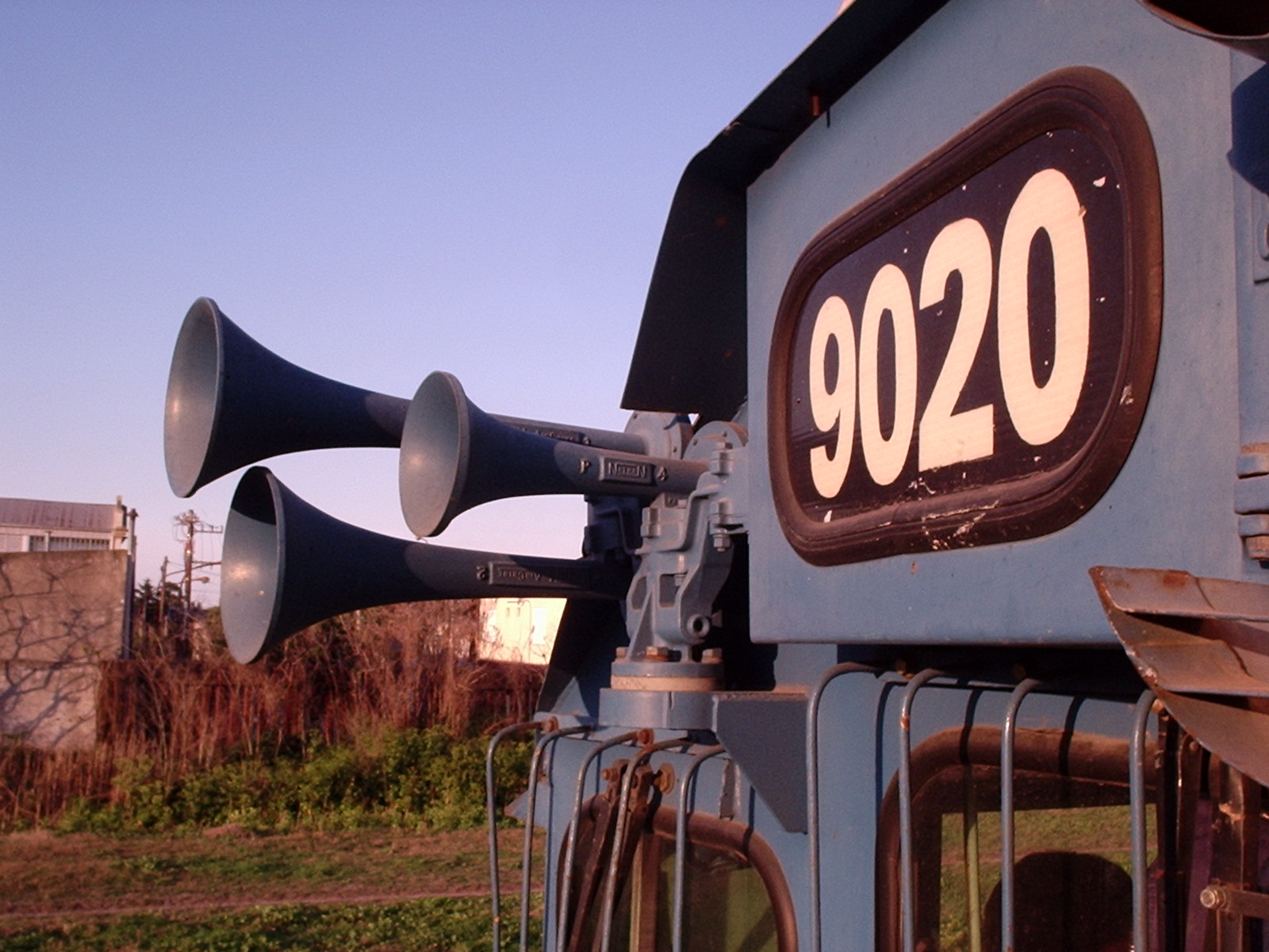 Bocina tritono de la Gt-22cw 9020 de Ferrosur Roca.